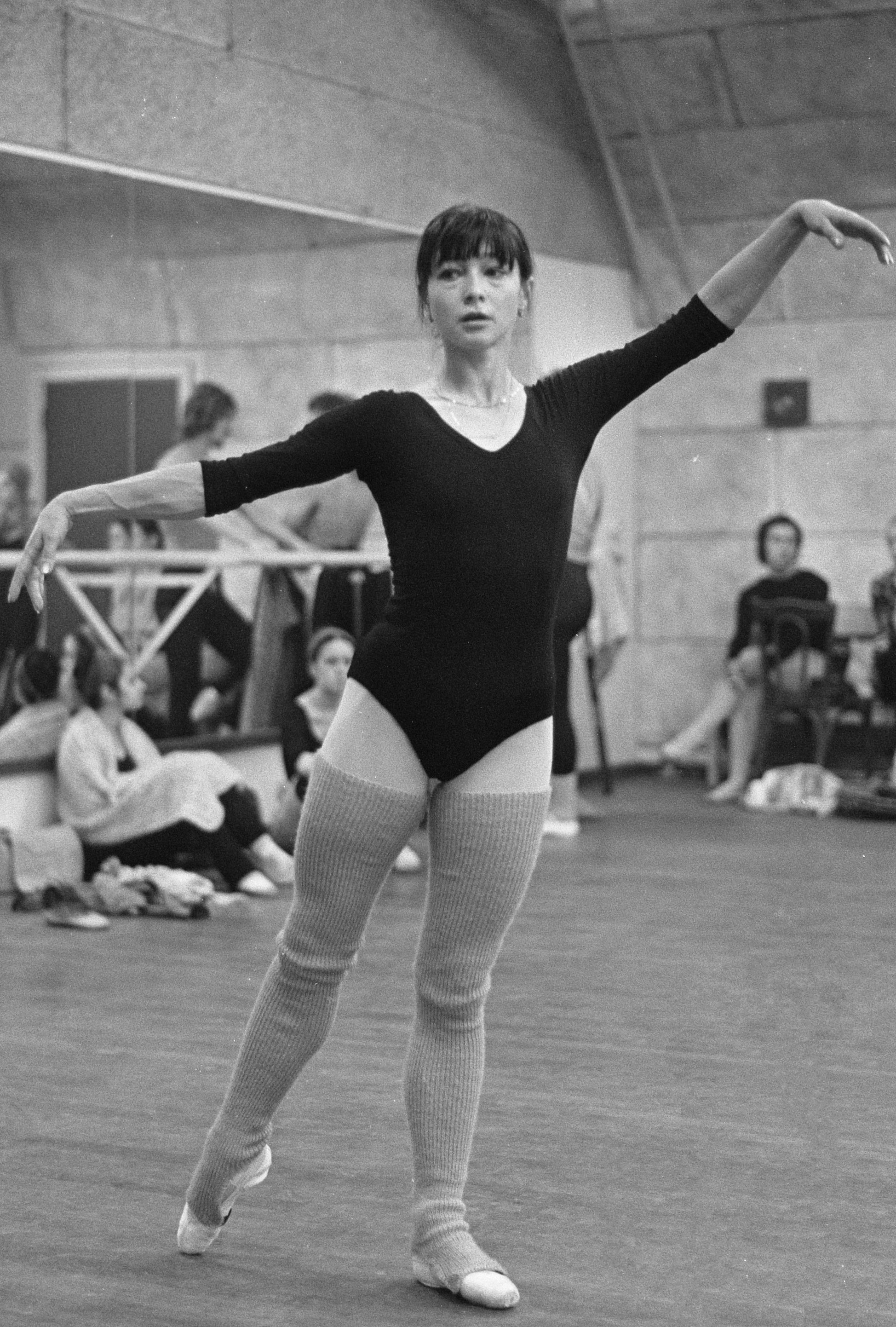 Russische danspaar Ekaterina Maximowa en Wladimir Wasiljew bij Nationaal Ballet tijdens repetitie Ekaterina Maximowa tijdens repetitie